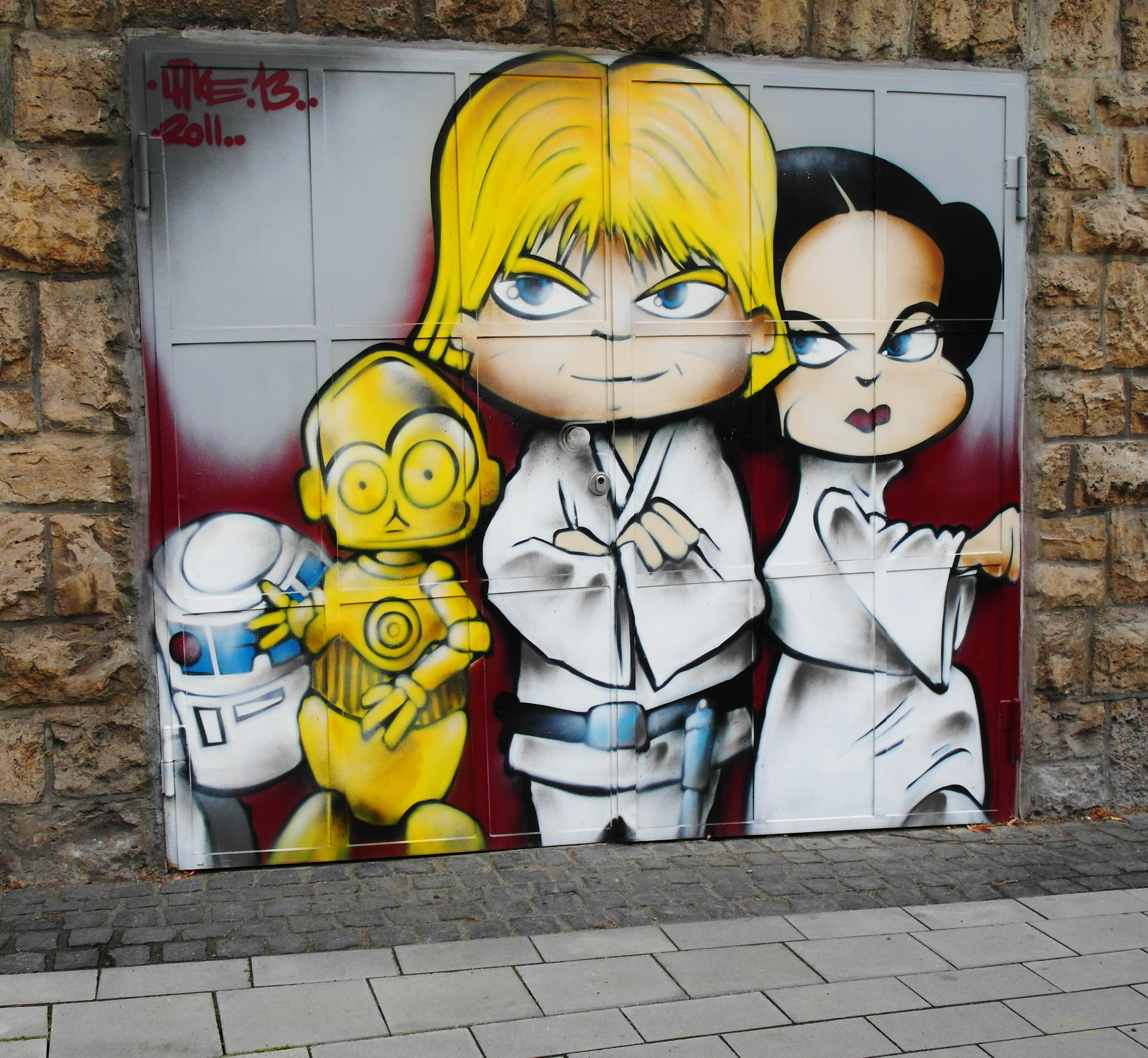 Graffiti von Lake13 mit nachempfundenen StarWars-Figuren auf einem Tor in der Aachener Viktoriaallee